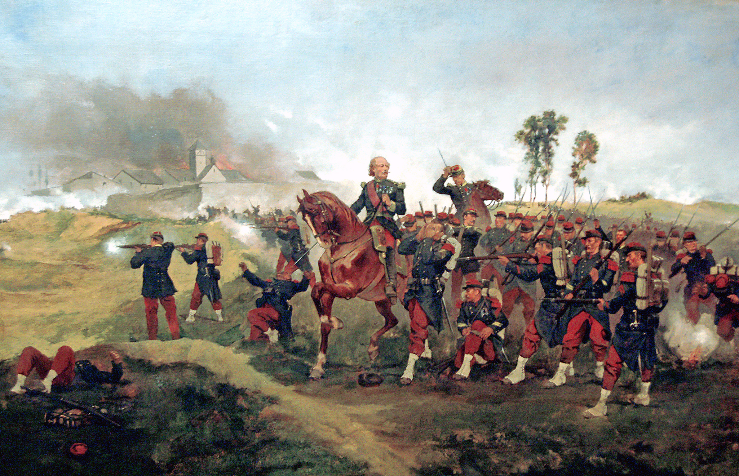 Tableau détenu par la Mairie de Saint-Privat la Montagne - Photo de Louis Delpérier (publiée avec leur accord)